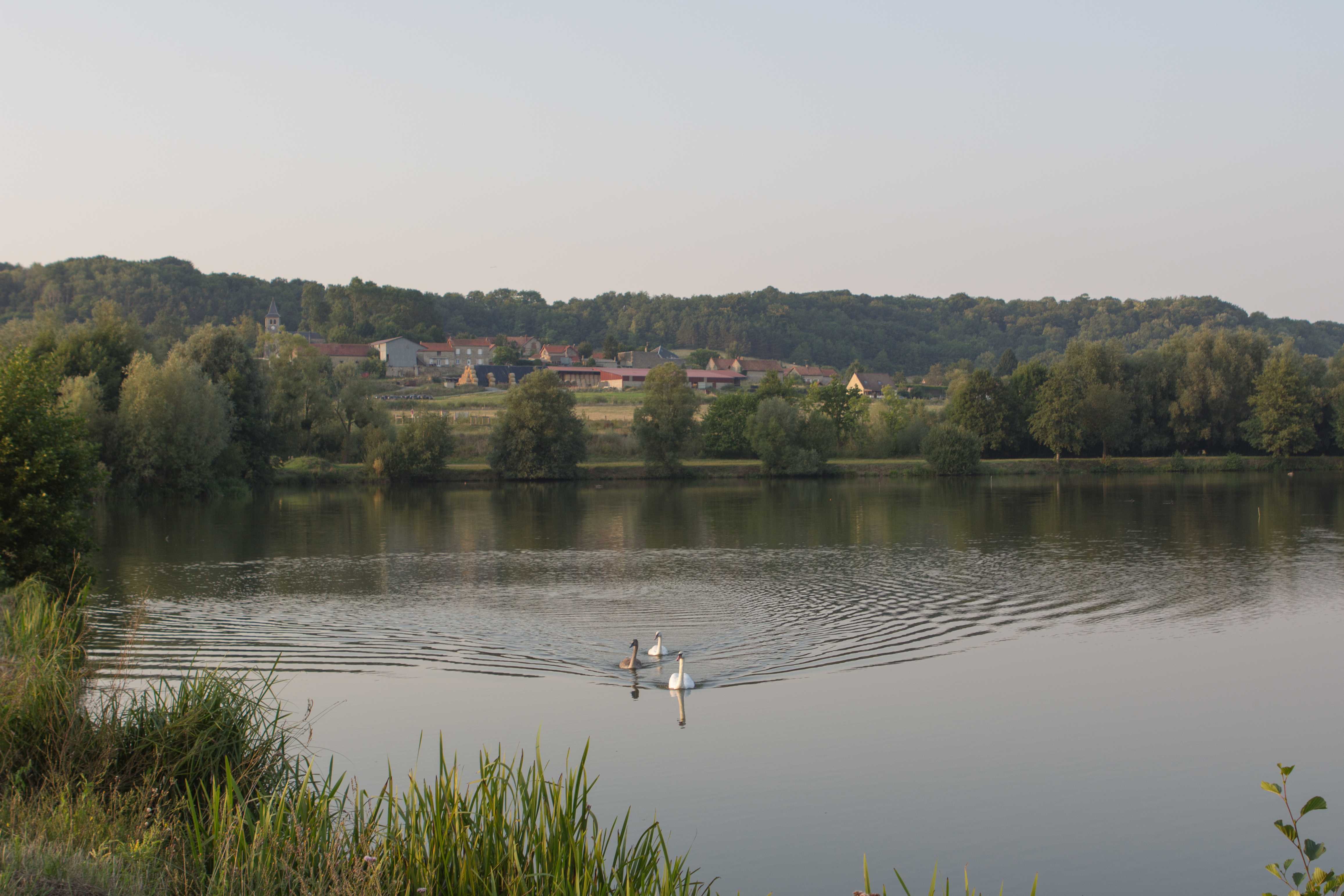 Vue de Neuville-sur-Ailette depuis le lac de l'Ailette, Neuville-sur-Ailette, Aisne, France